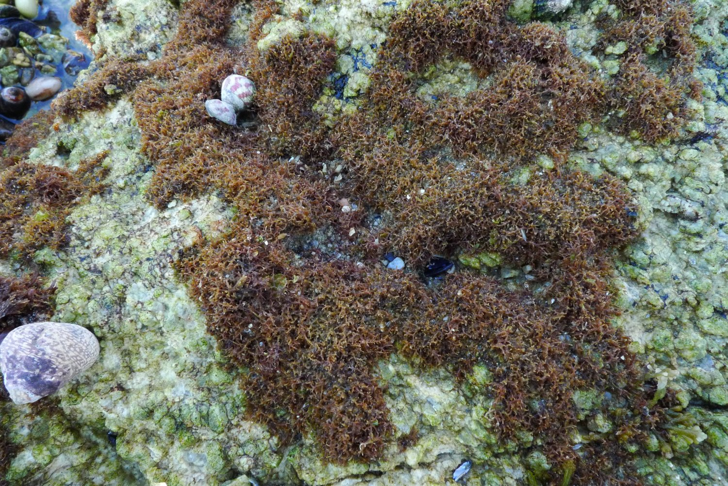 Caulacanthus ustulatus, Gâvres (Morbihan, Bretagne, France)